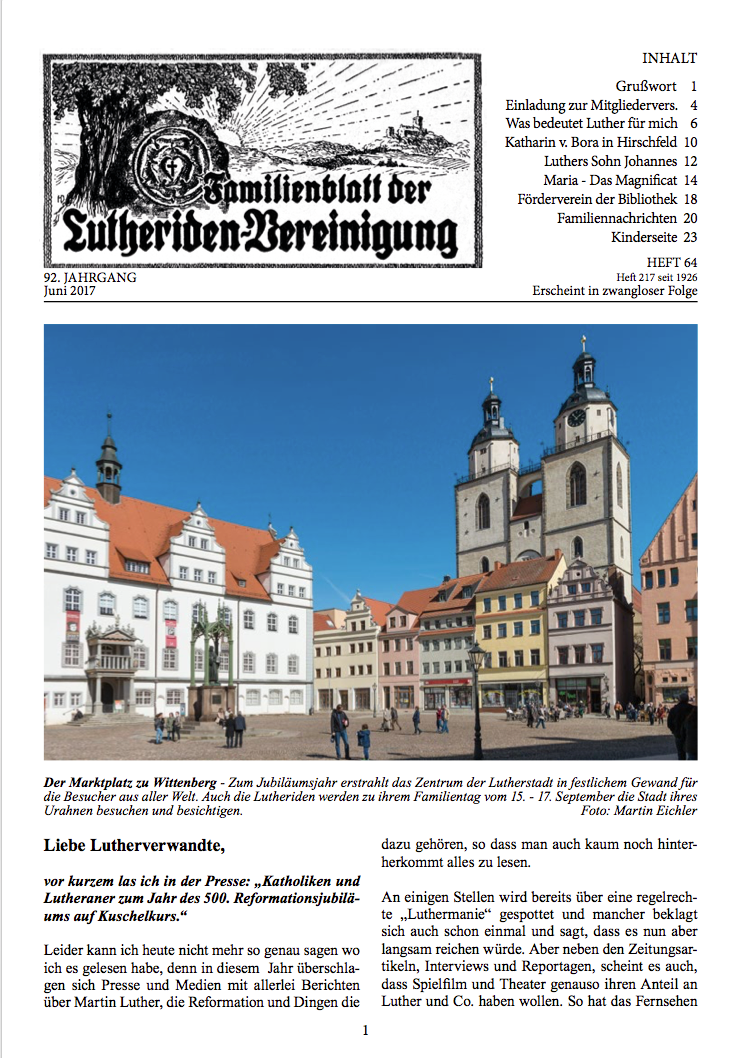 Titelblatt Familienblatt 06 2017